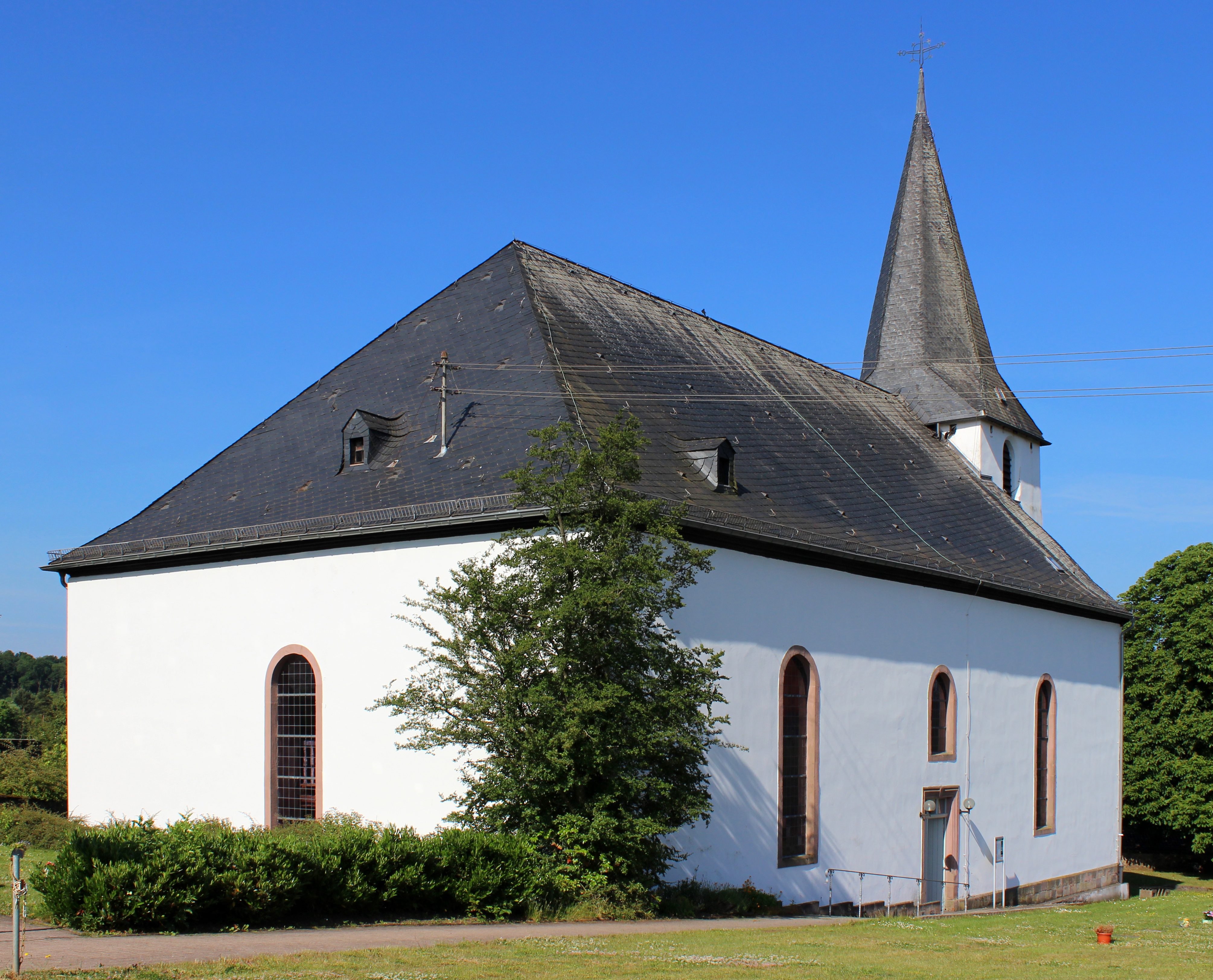 Evangelische Kirche in Wolfersweiler, Gemeinde Nohfelden, Landkreis St. Wendel, Saarland